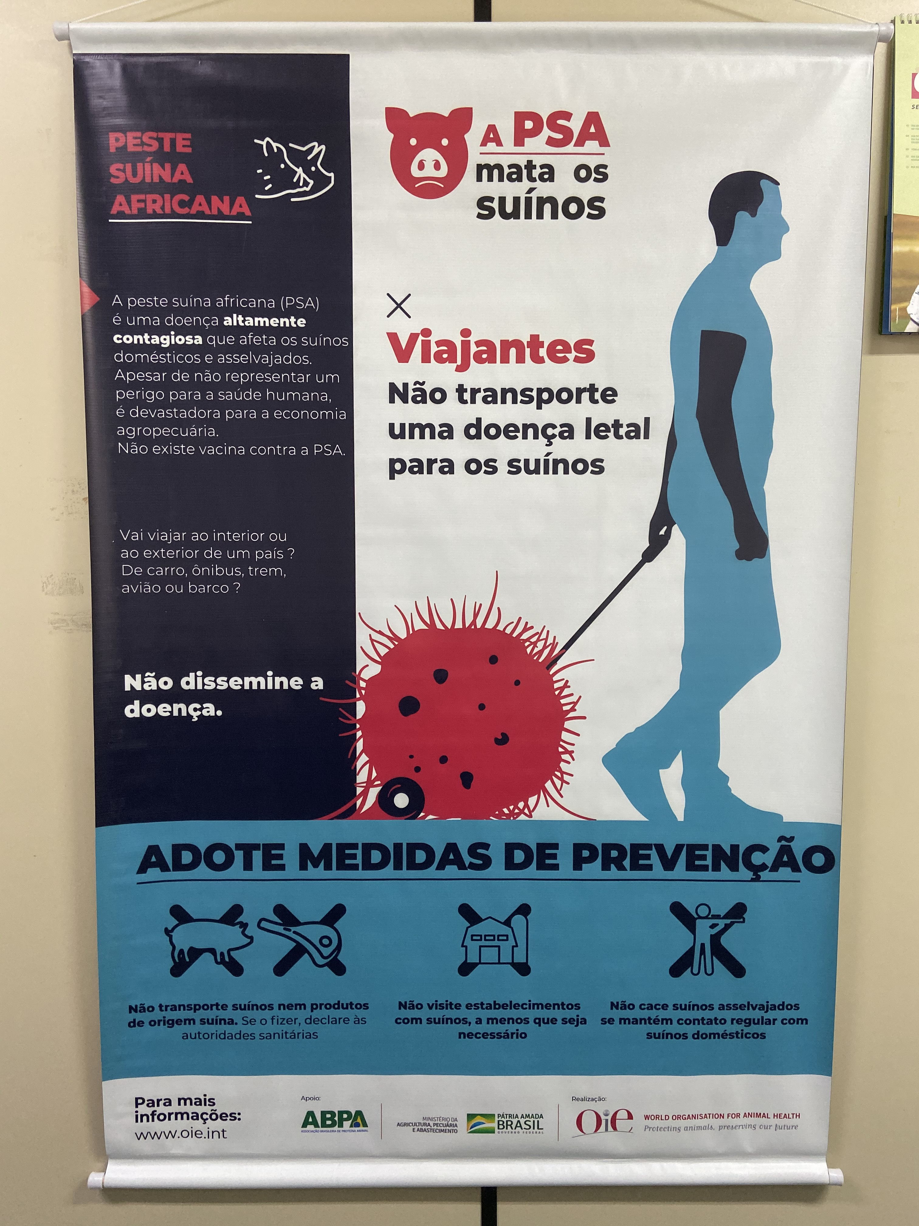 Banner informativo no Aeroporto Internacional de São Paulo sobre prevenção à Peste Suína Africana no Brasil